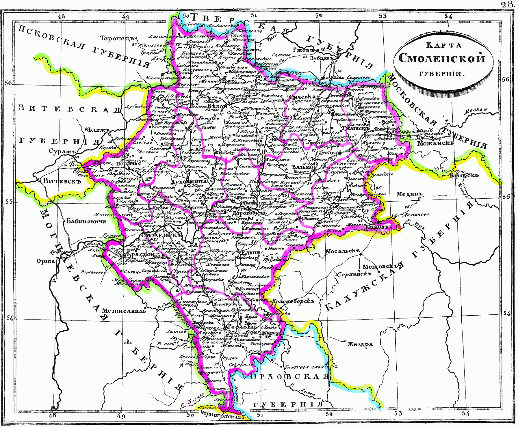 Карта Смоленской губернии, 1835